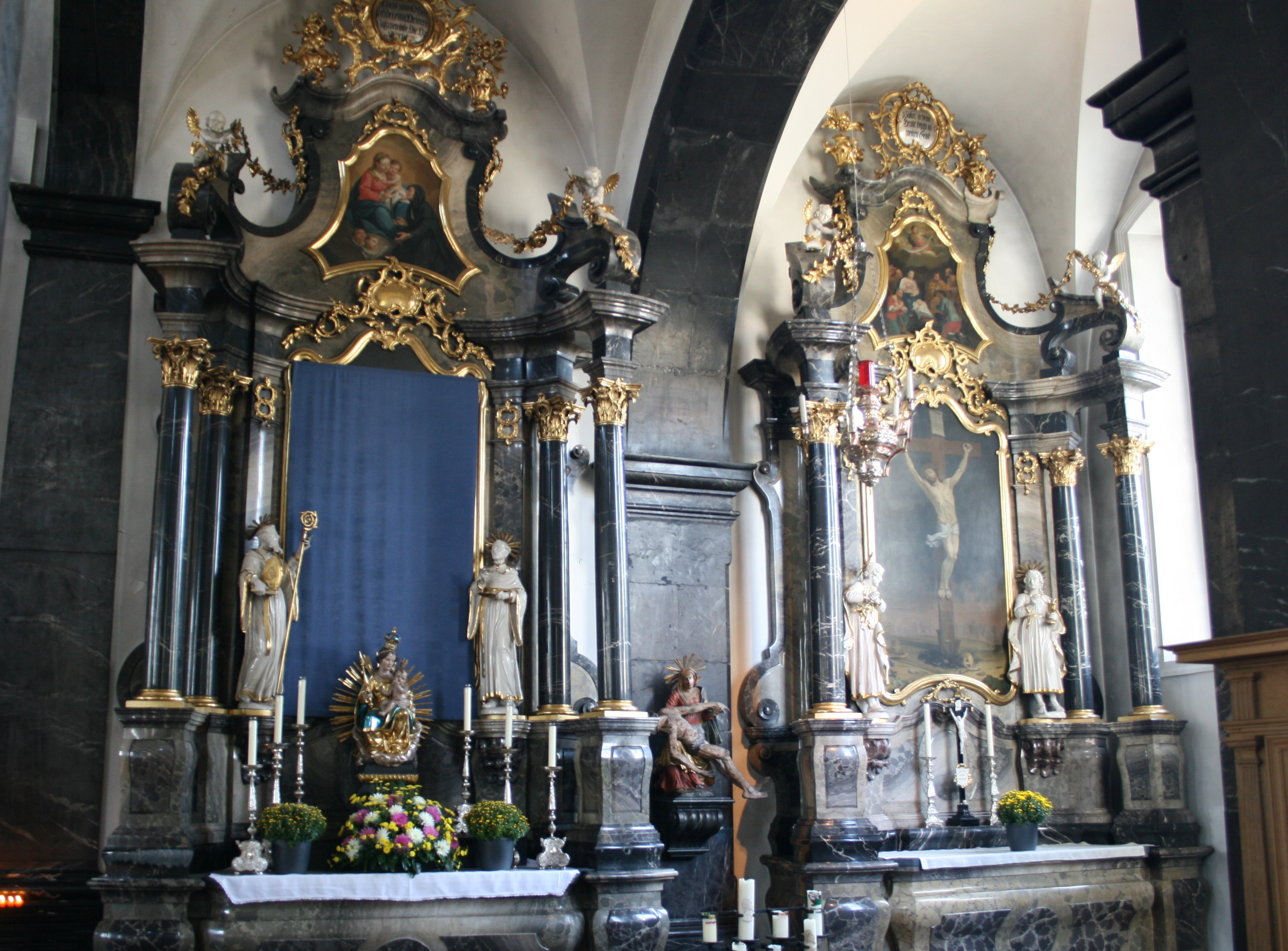 Pfarr- und Wallfahrtskirche Sachseln, Schweiz, rechte Seitenaltäre